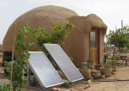 Lotan